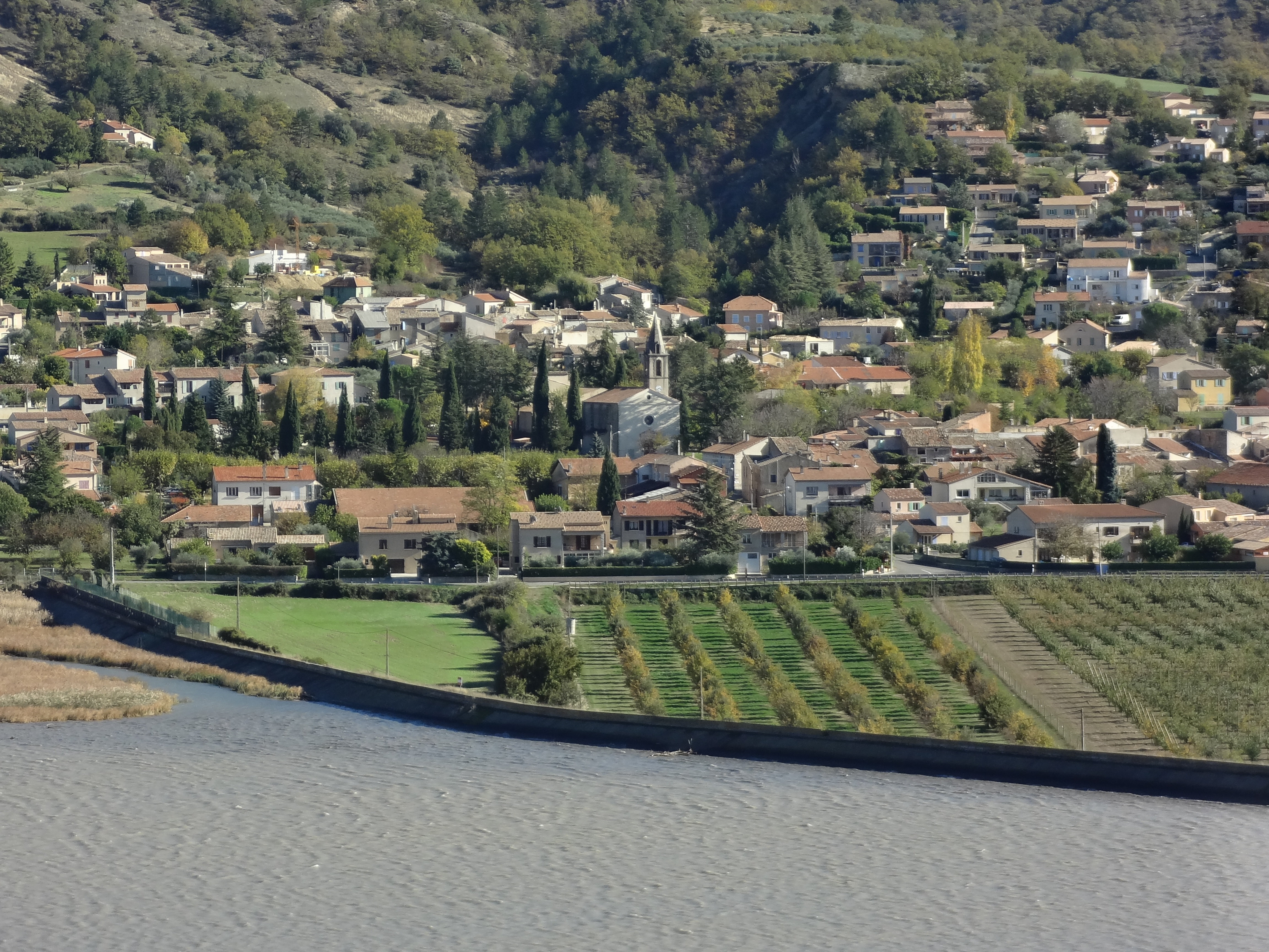 Vue du village de L'Escale (Alpes-de-Haute-Provence), lac de L’Escale au premier plan, église Notre-Dame de Mandanois